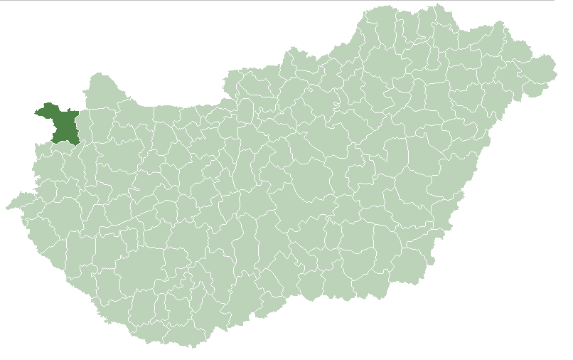 Poloha okresu v rámci Maďarska.